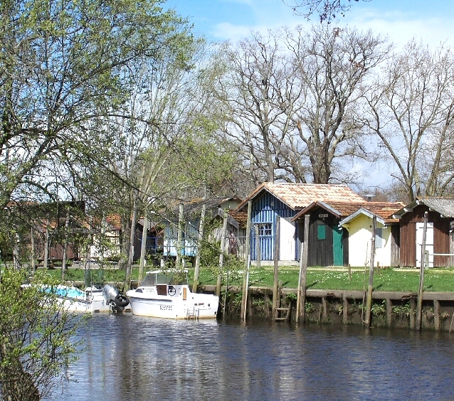 Le port de Biganos